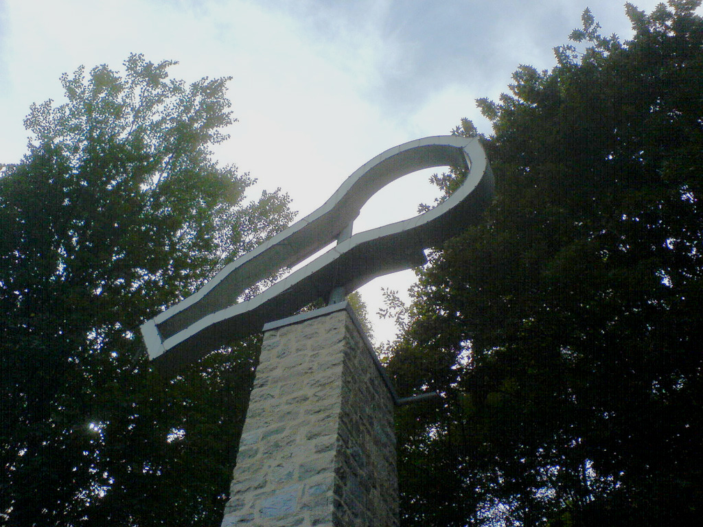 Göbelbastei in Springe